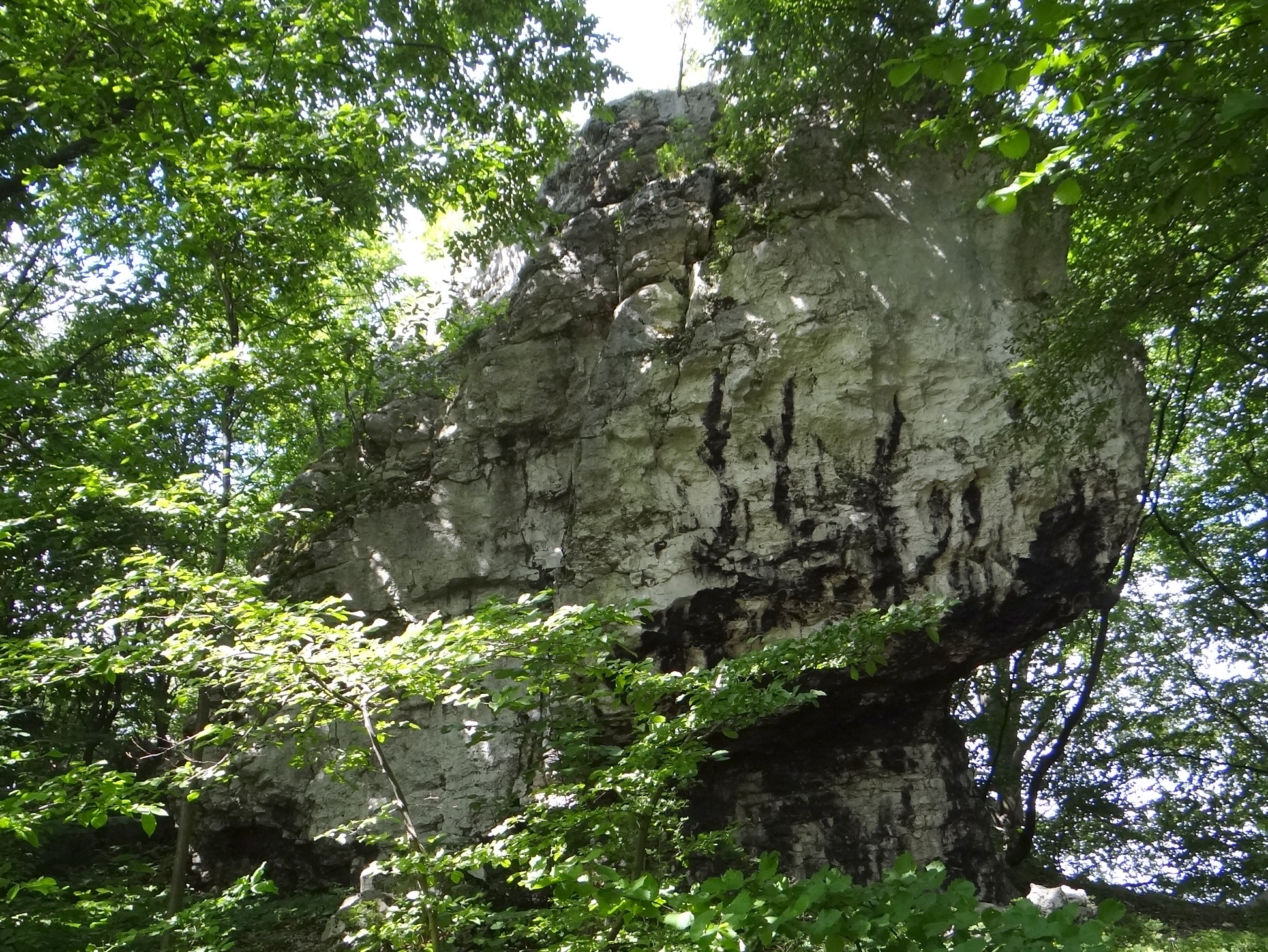 Skała Foka (Pomorzańskie Skałki)